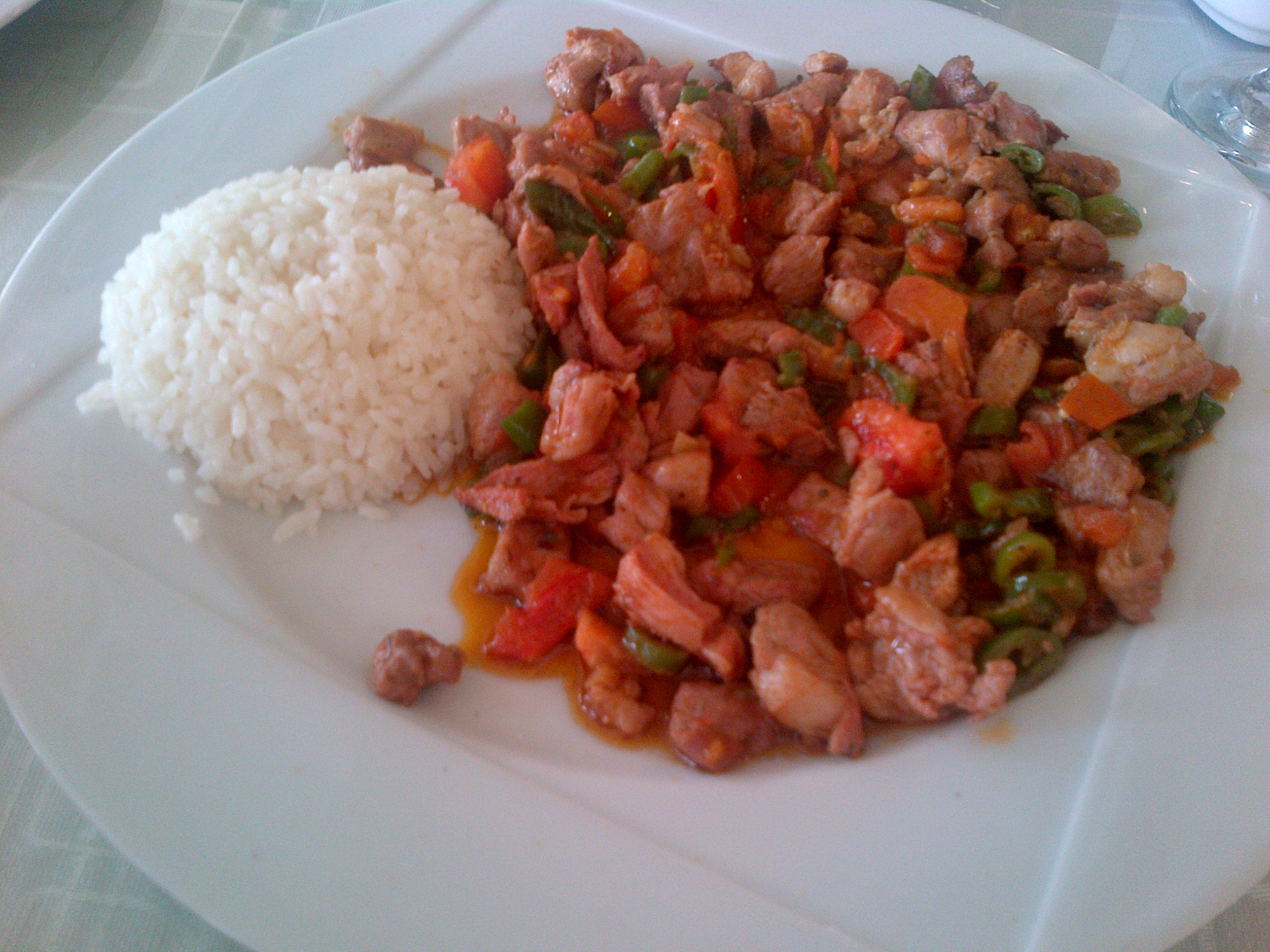 Çoban kavurma és pot servir amb una mica d'arros blanc.